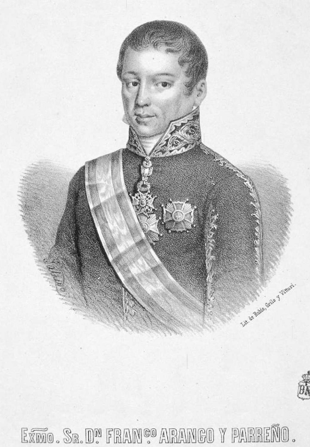 Francisco Arango y Parreño, litografía de Isidoro Salcedo y Echevarría. Biblioteca Nacional de España